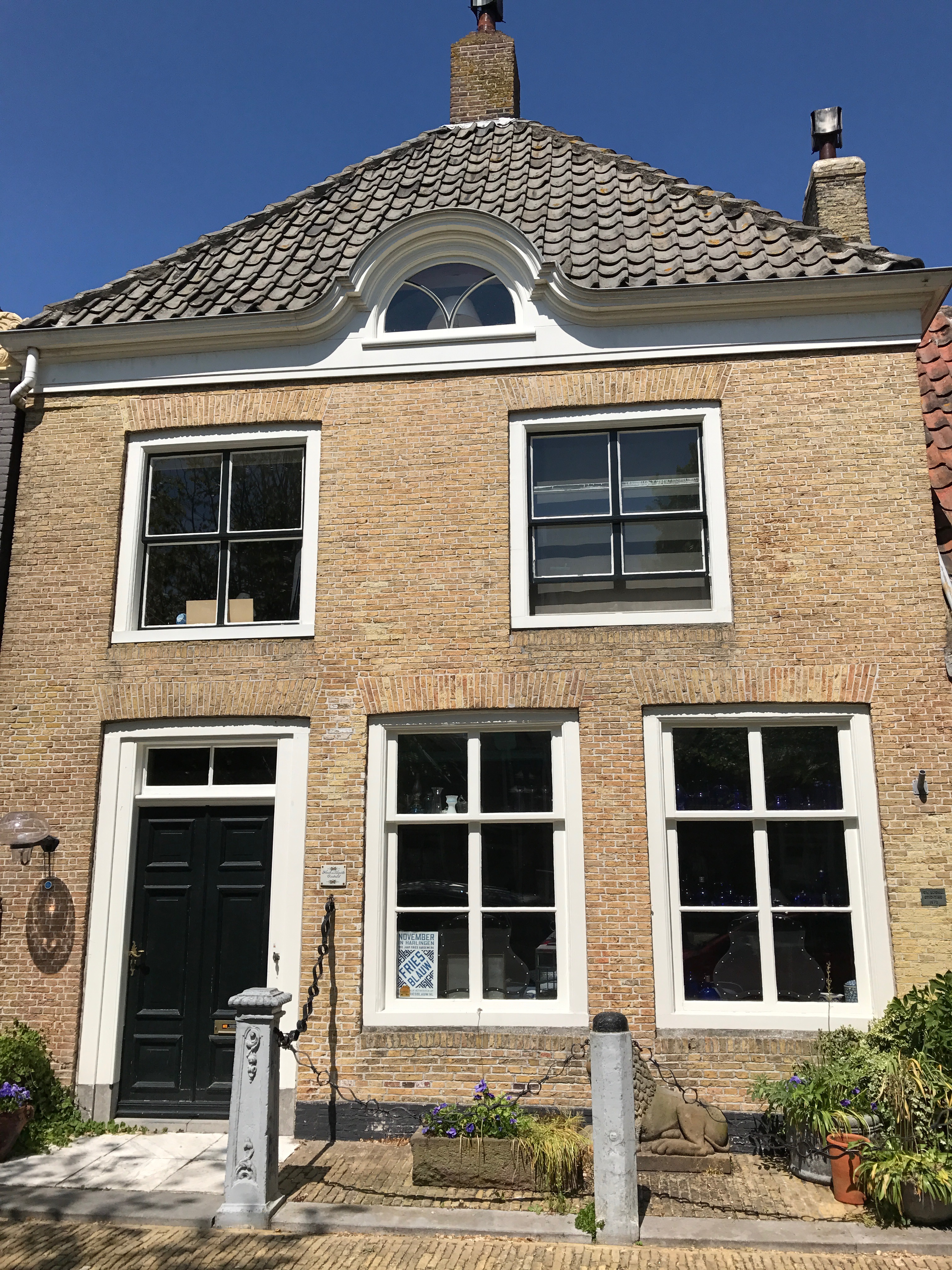 Zoutsloot 53